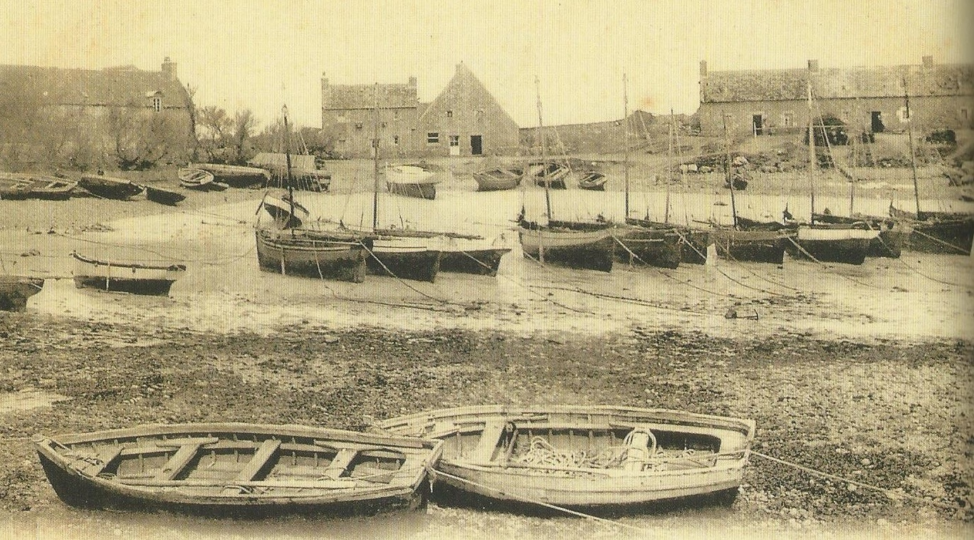 Île de Sieck : le port (en fait un simple havre d'échouage) au début du XXème siècle